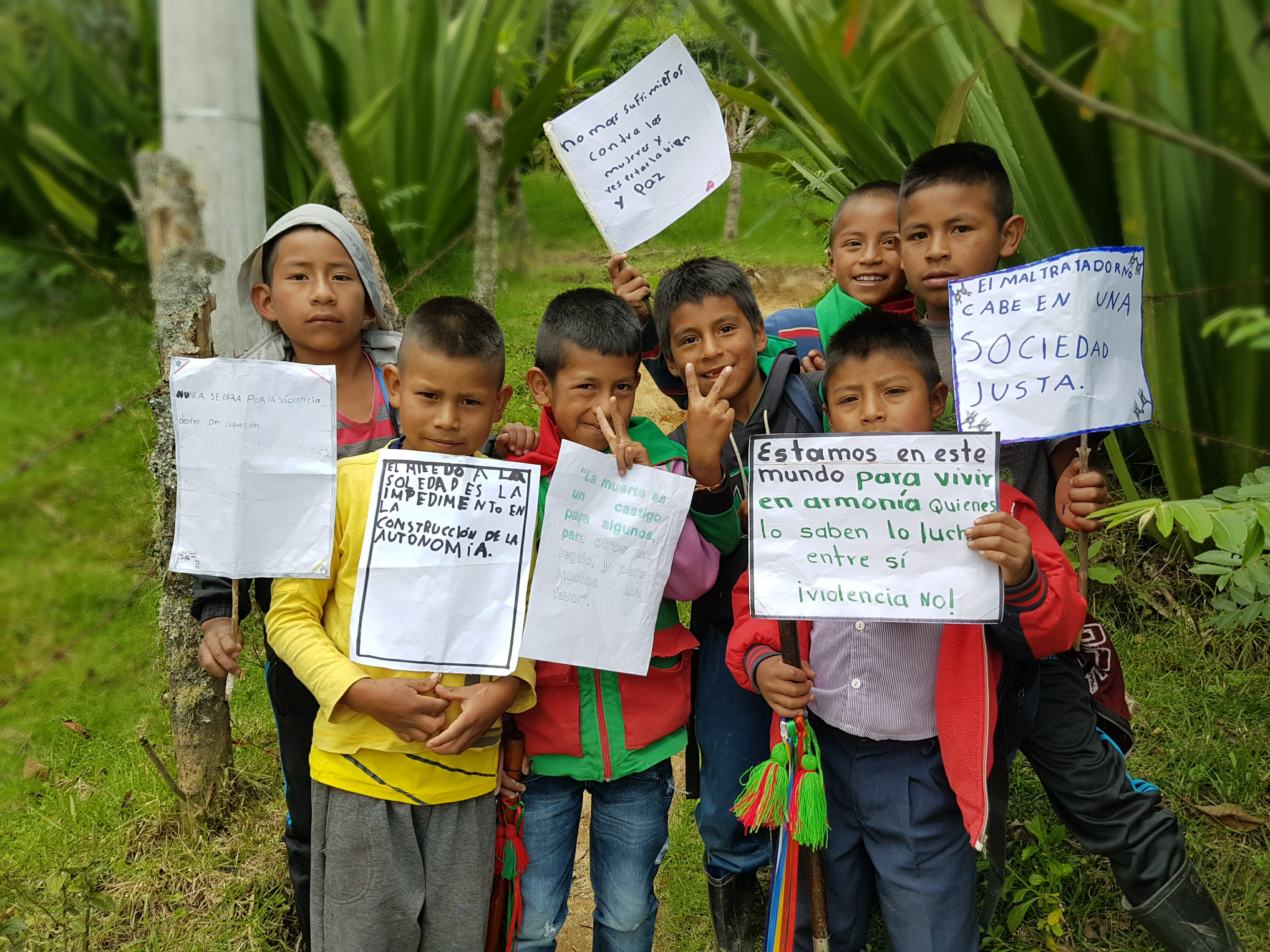 niños nasa en la vereda Zolapa - Jambaló (Cauca - Colombia)